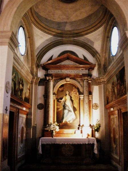 Francesco Zugno (?) La gloria di Santa Margherita, chiesa di Santa Margherita in Padova.